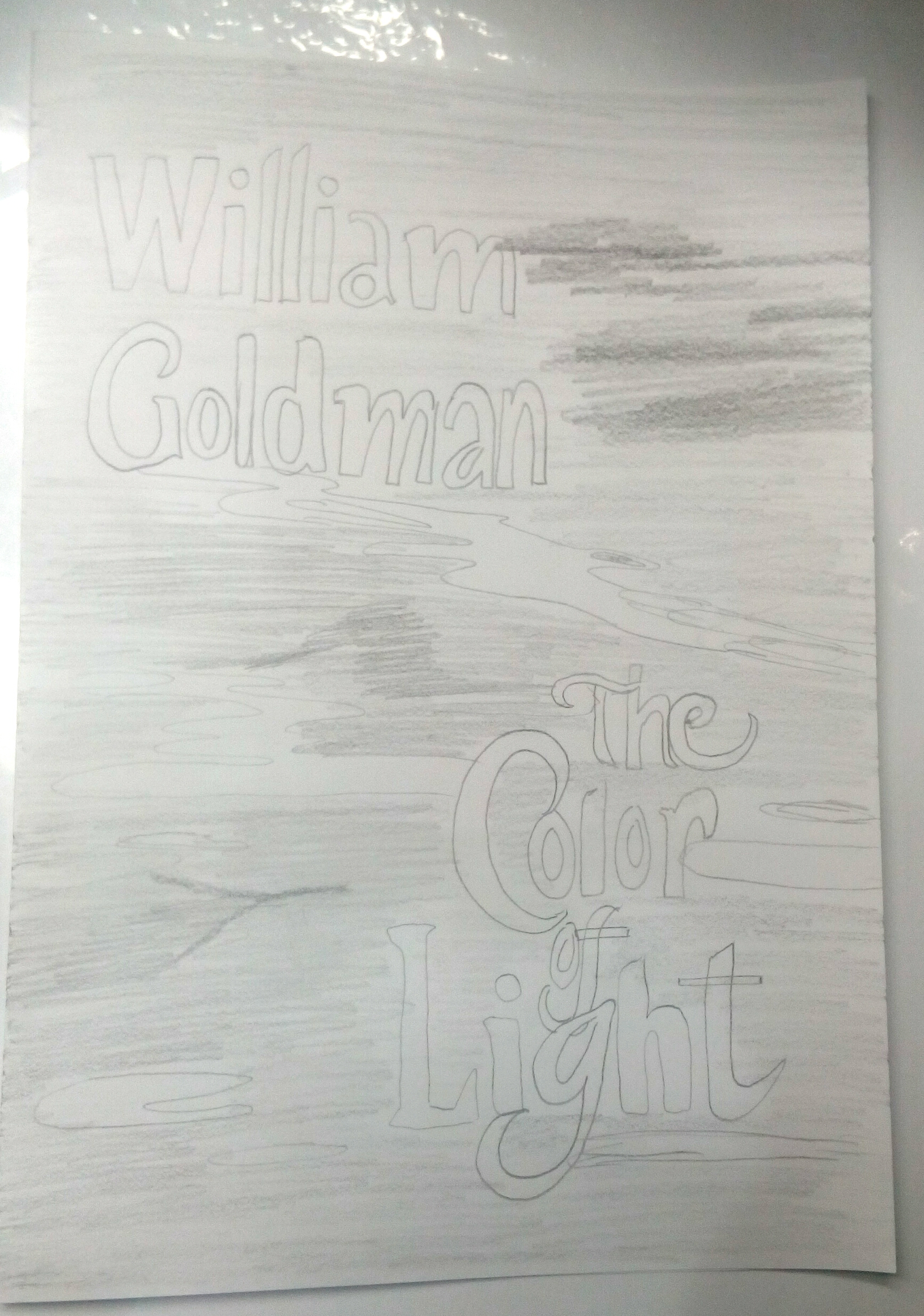 Dibujo de la portada de la novela "The color of Light", escrita por William Goldman.